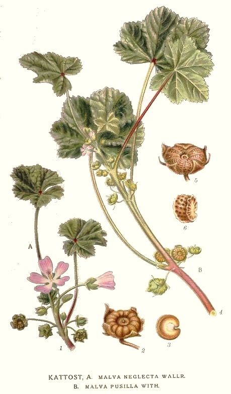 Original Description Kattost A. Malva neglecta Wallr. B. Malva pusilla With.